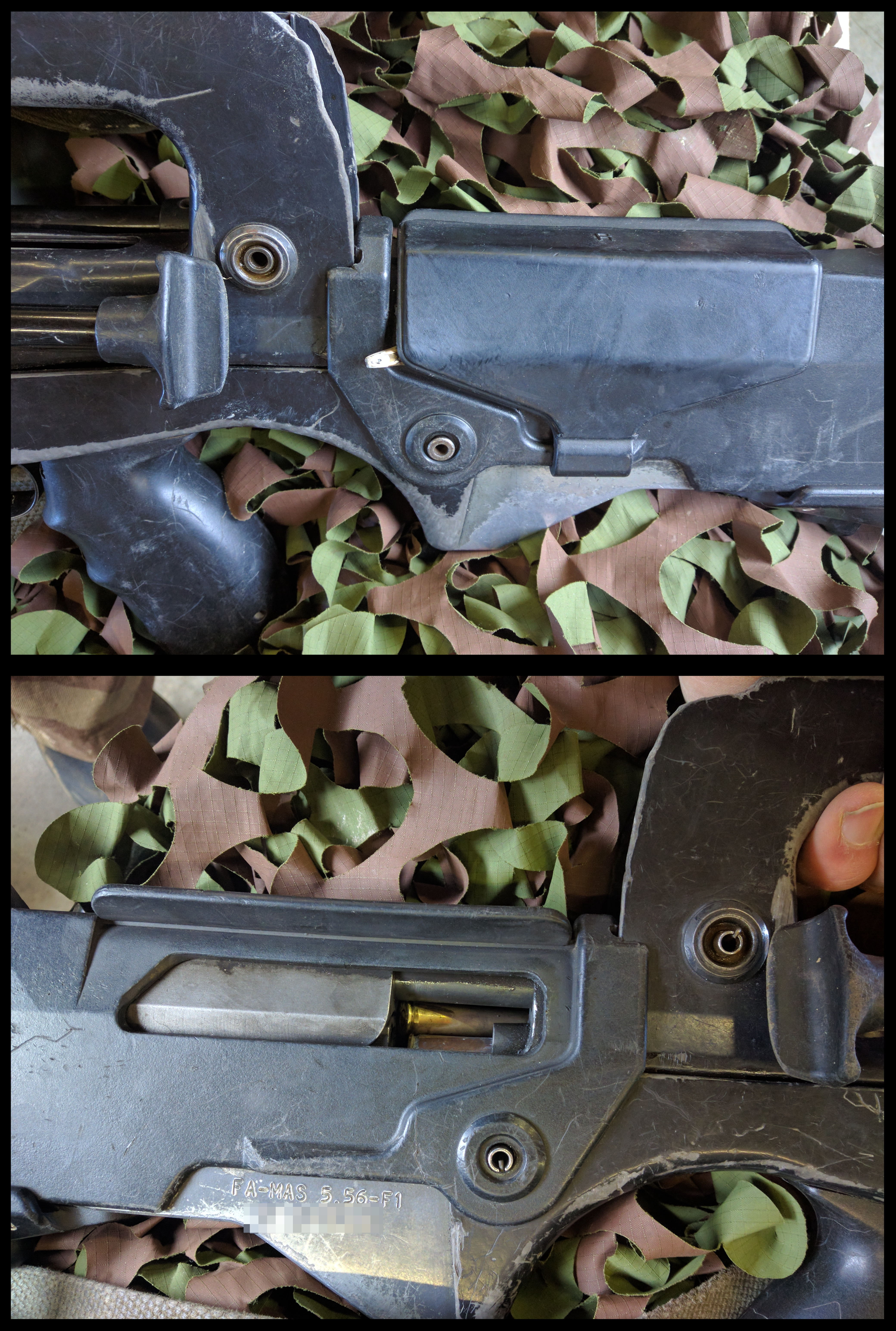 Double introduction de munition inertes ayant fait ressortir la tête d'une cartouche inerte par l'appuie-joue.